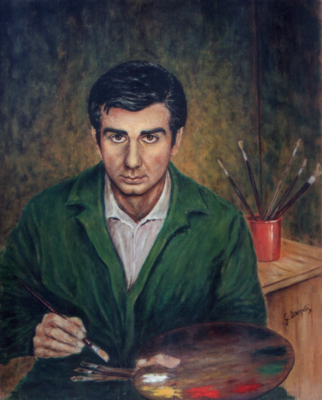 Self-portrait Guido Marzulli. Anno 1969.